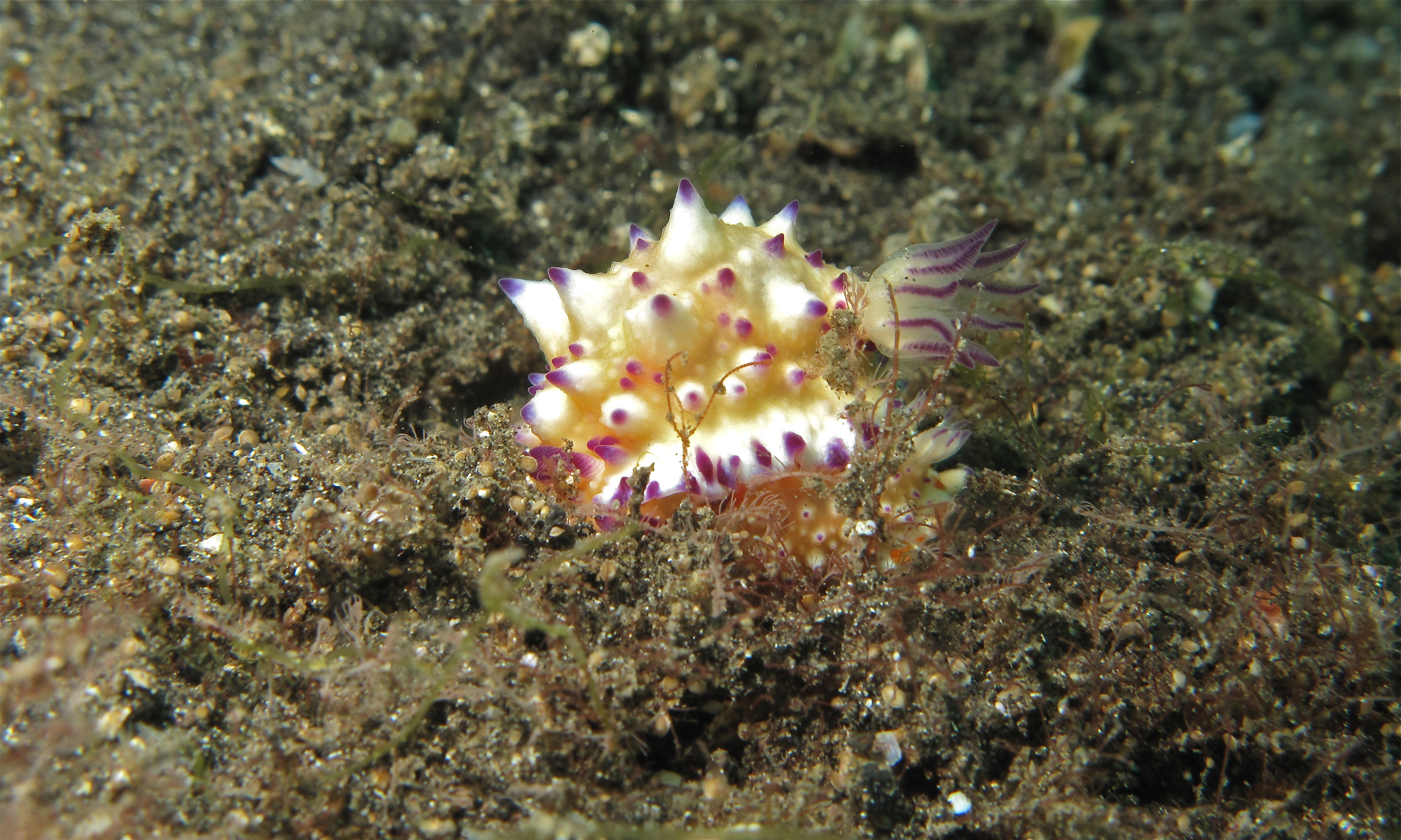 Makawide Island, Lembeh Strait, Sulawesi, INDONESIA